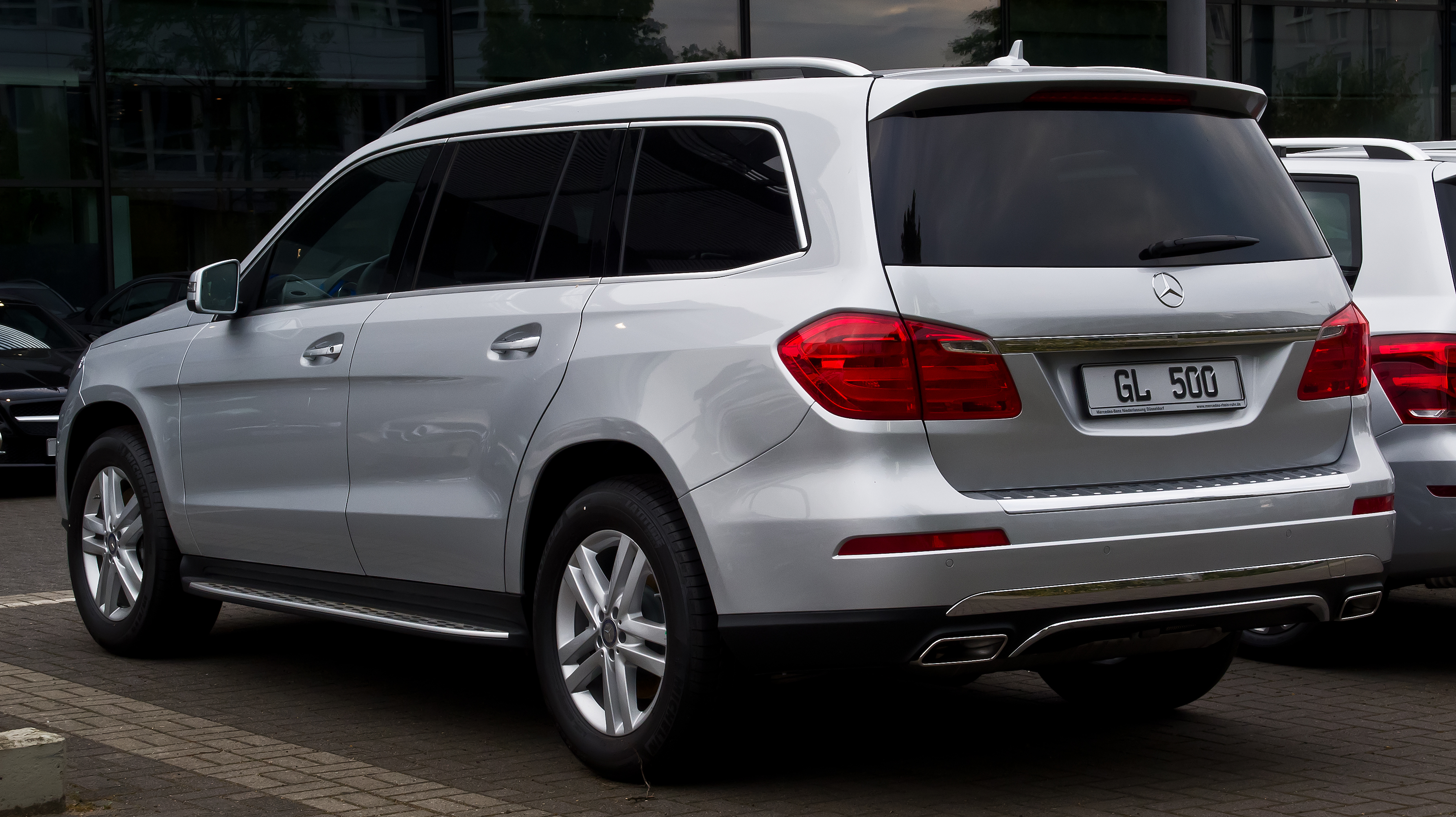 Mercedes-Benz GL 500 4MATIC (X 166)